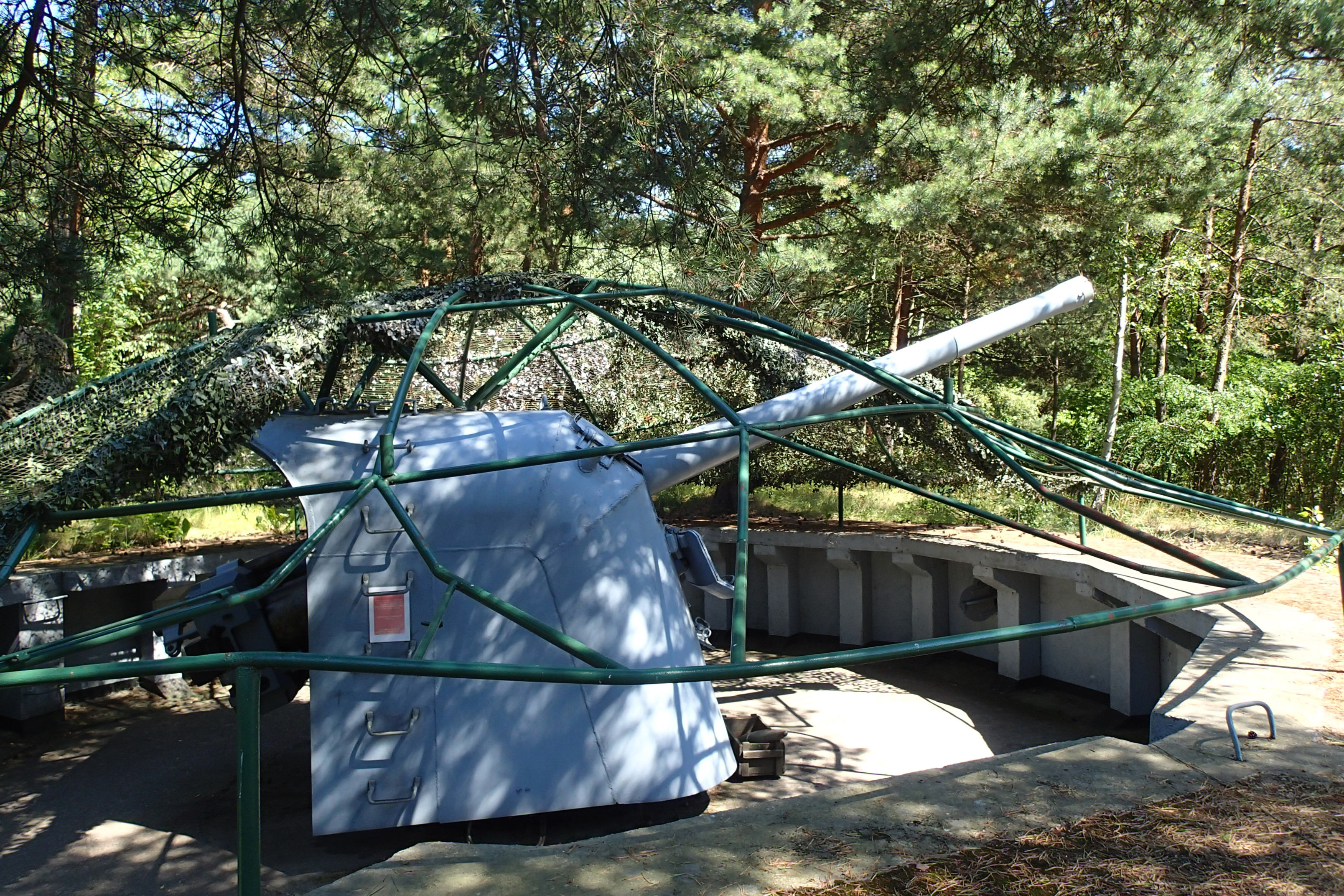 Muzeum na terenie baterii artyleryjskiej nr 31 im. Heliodora Laskowskiego